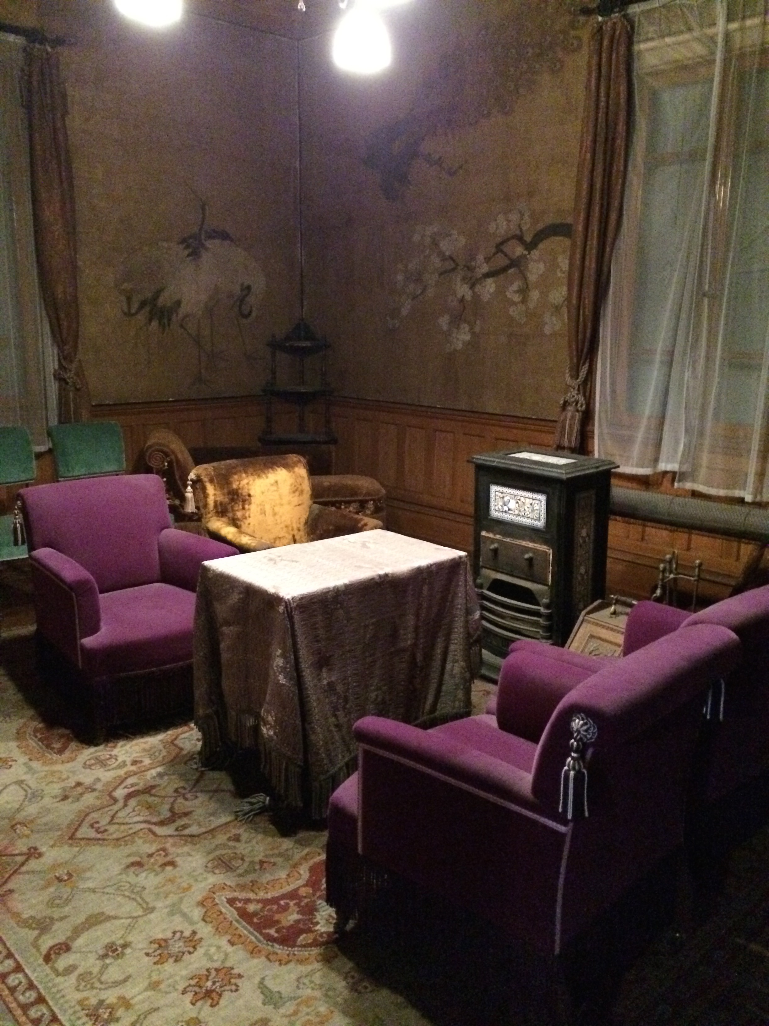 無鄰庵の洋館２階、無鄰庵会談が行われた部屋